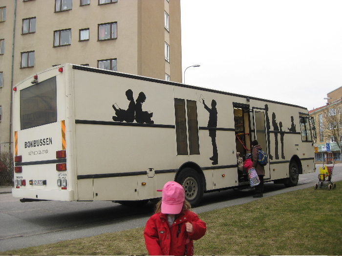 En av Göteborg stads bokbussar.